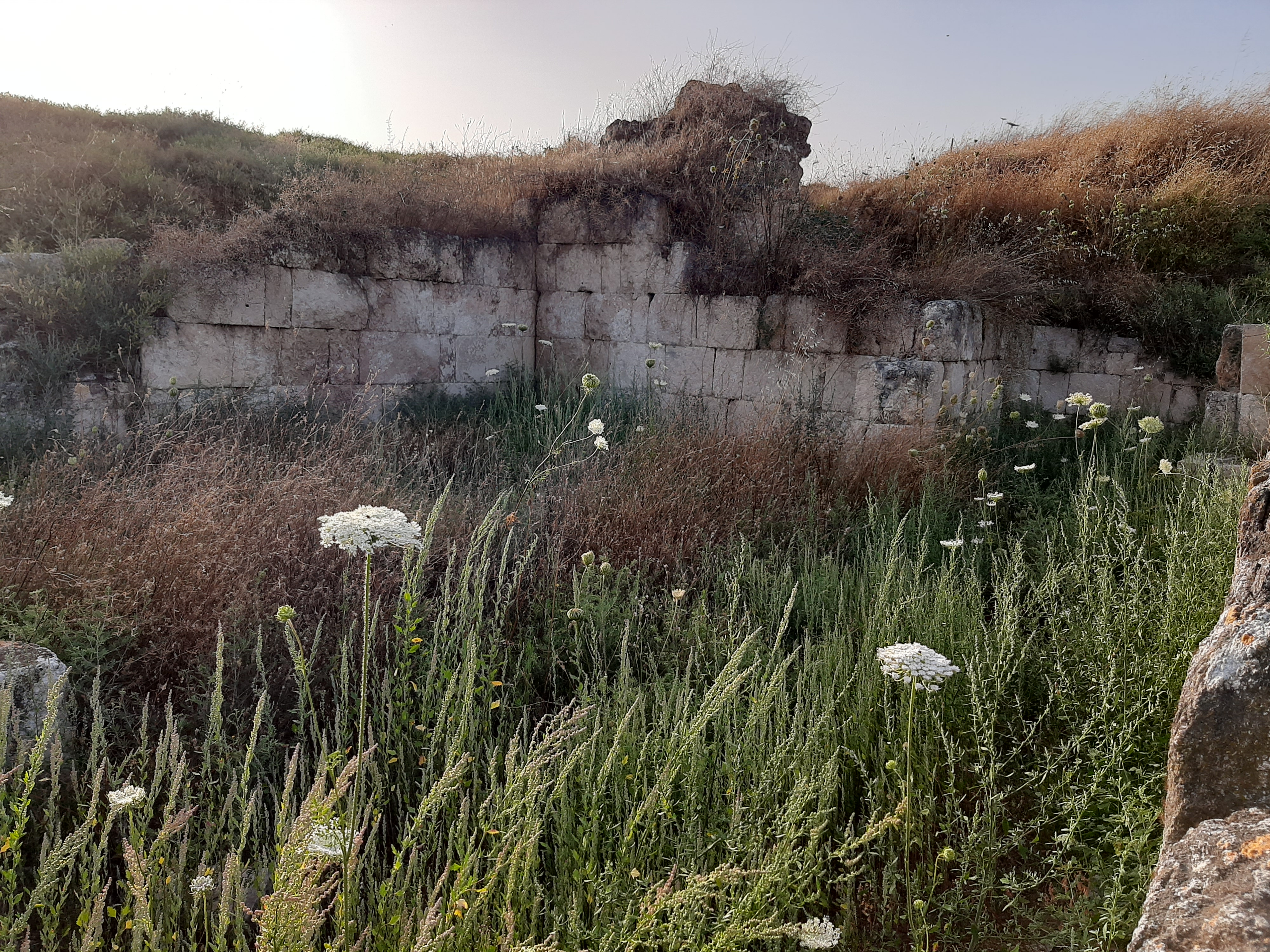 صورة لآثار ثصر المنية إلتقتطها بنفسي palestine11